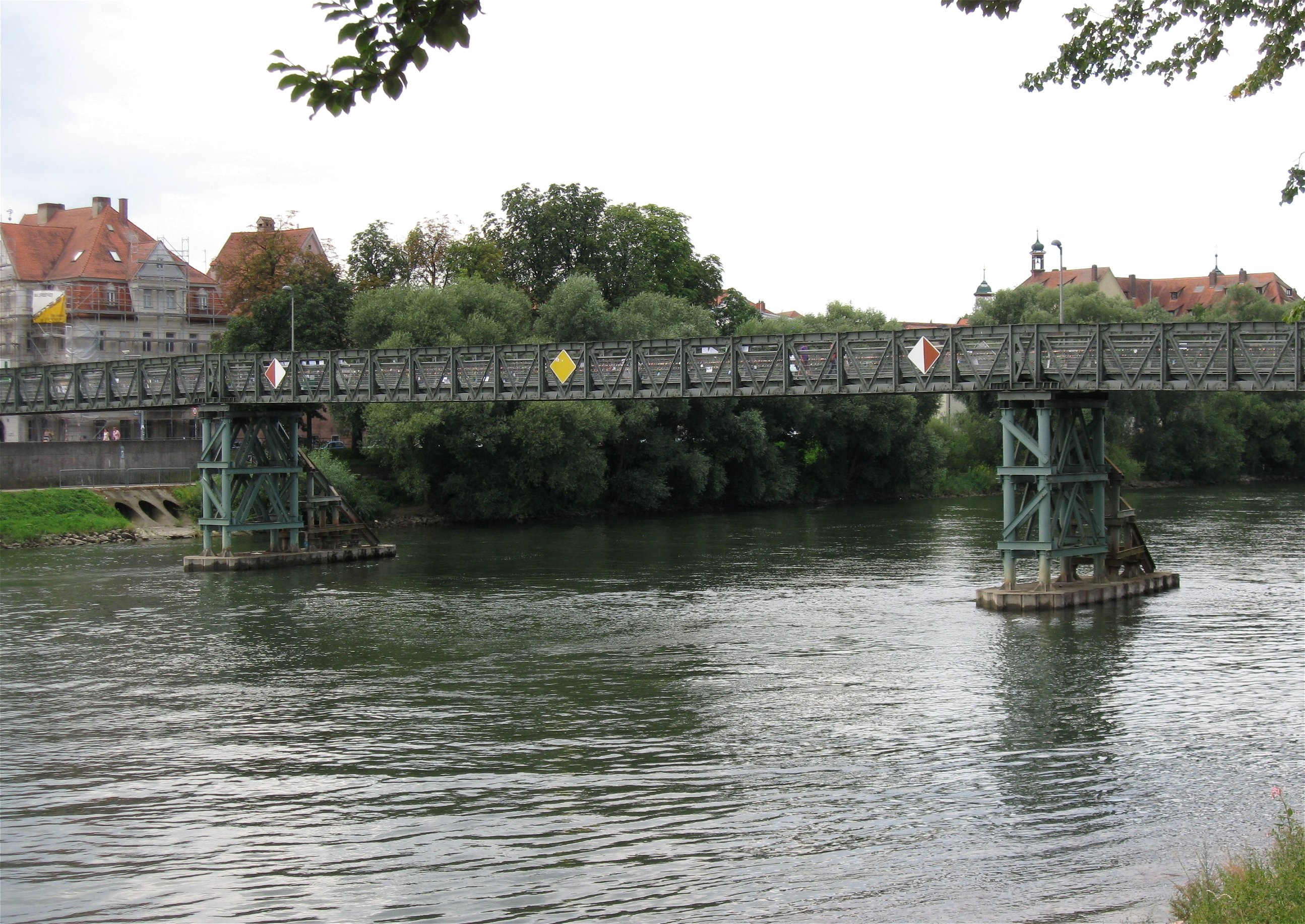 Am Weinmarkt; Badstraße; Donau; Nähe Holzländestraße. Fußgängersteg über die Donau, sog. Eiserner Steg, Brücke auf zwei Strompfeilern, als Übergang ehem. LZBrücke der deutschen Wehrmacht zweitverwendet, geschraubte Fachwerkkonstruktion aus Stahl, 1947; zwei Brückenköpfe mit je zwei Aufgängen und Resten von Rampen, Kalkstein, 1901.